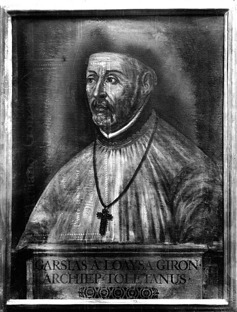 García Loaysa y Girón (Talavera de la Reina, 1534 - Alcalá de Henares, 22 de febrero de 1599) fue un eclesiástico español, Arzobispo de Toledo desde el 8 de julio de 1598.